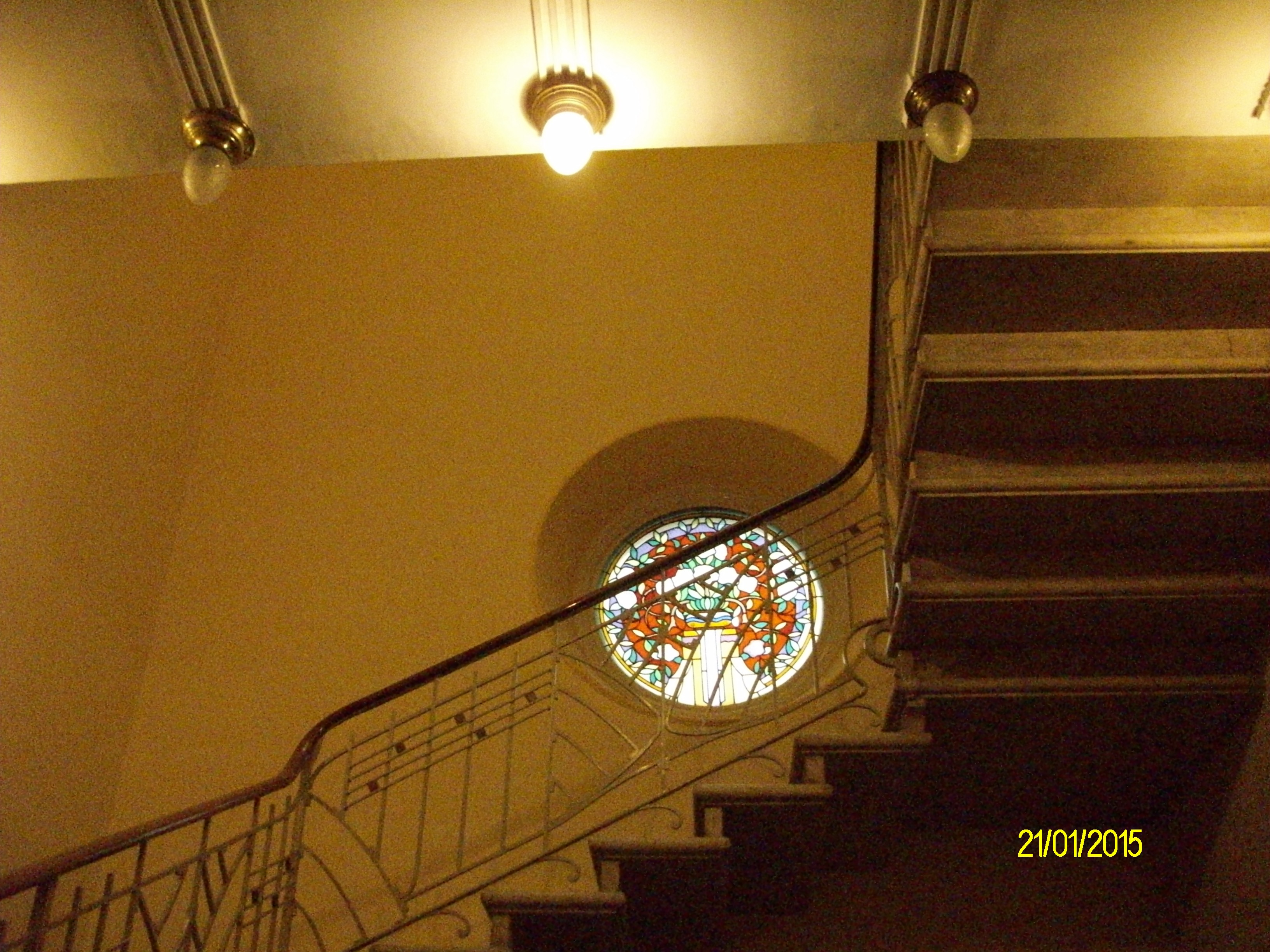 Vetrata scala